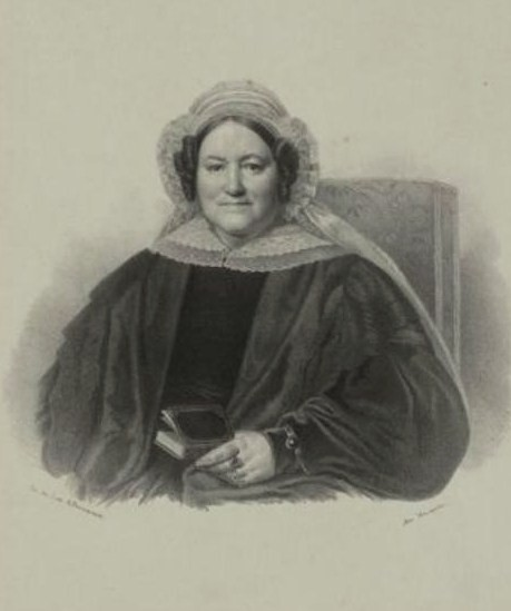 Агафоклея Марковна Сухарева, урождённая Полторацкая (30.07.1776—31.01.1840) — общественный деятель, благотворительница, тайная советница.